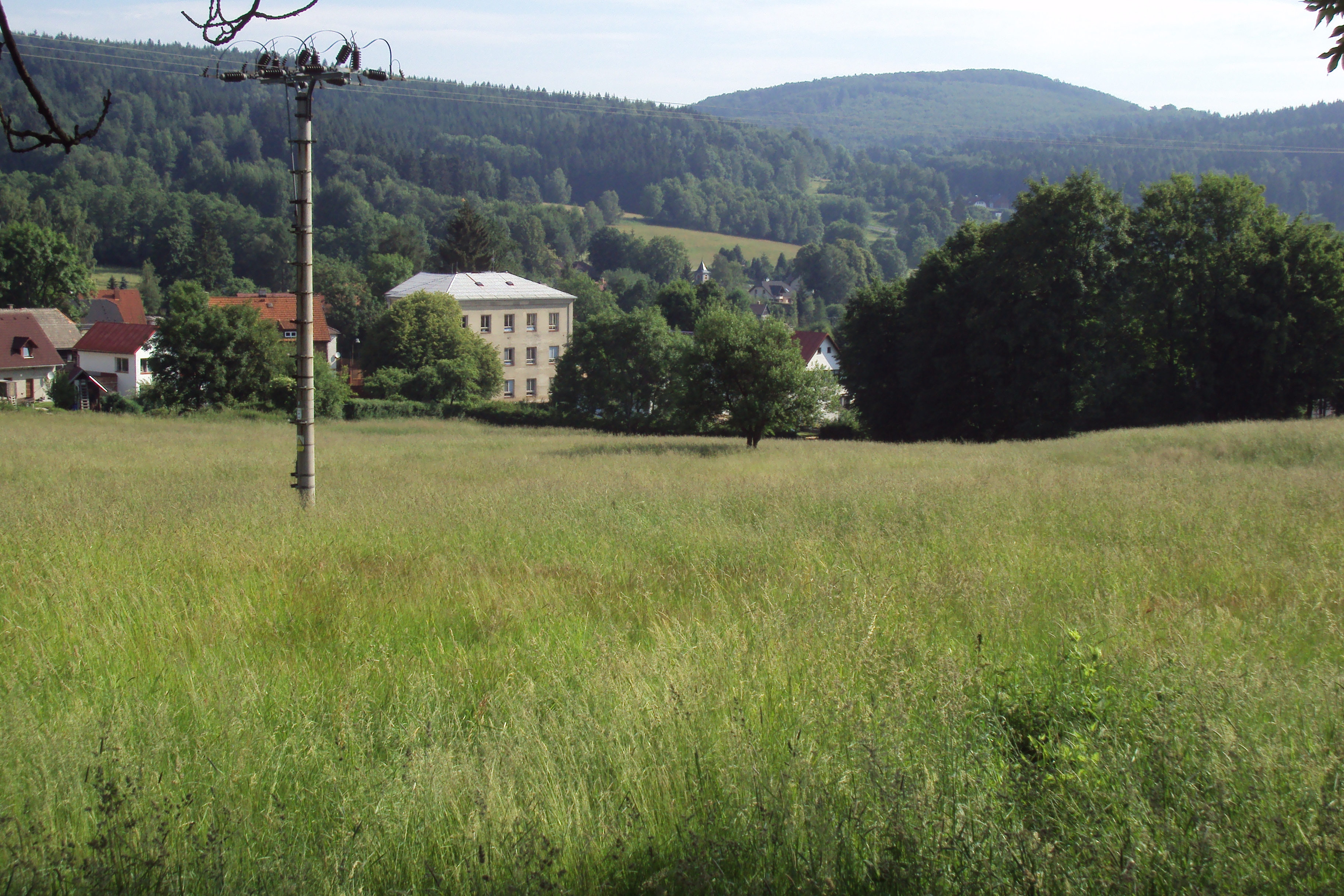 Domky v Polevsku, na obzoru zleva Medvědí hůrka, Malý Buk a Medvědí vrch